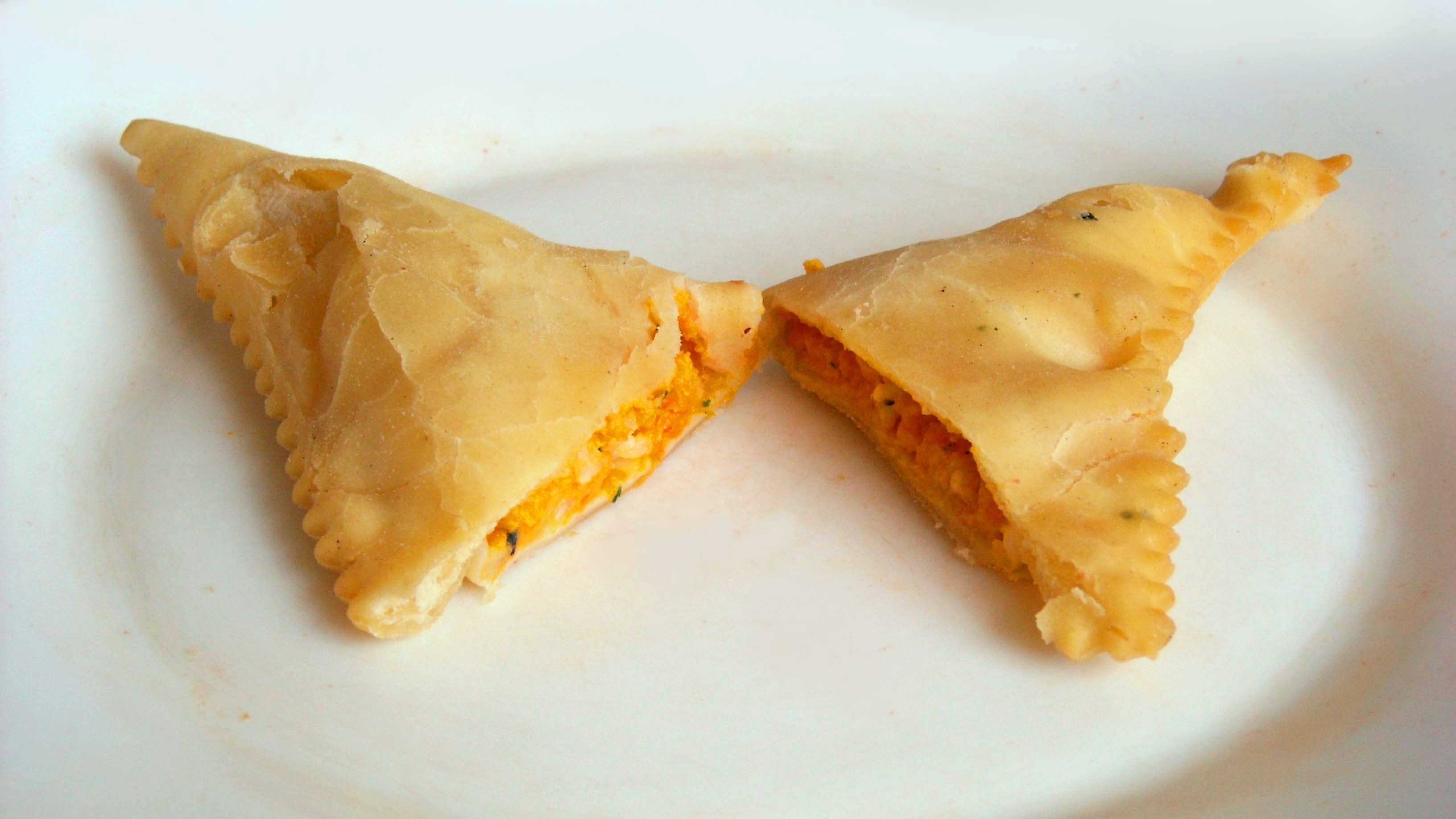 Grande raviolo chiamato barbagiuai nella zona di Ventimiglia, Liguria, Italia.